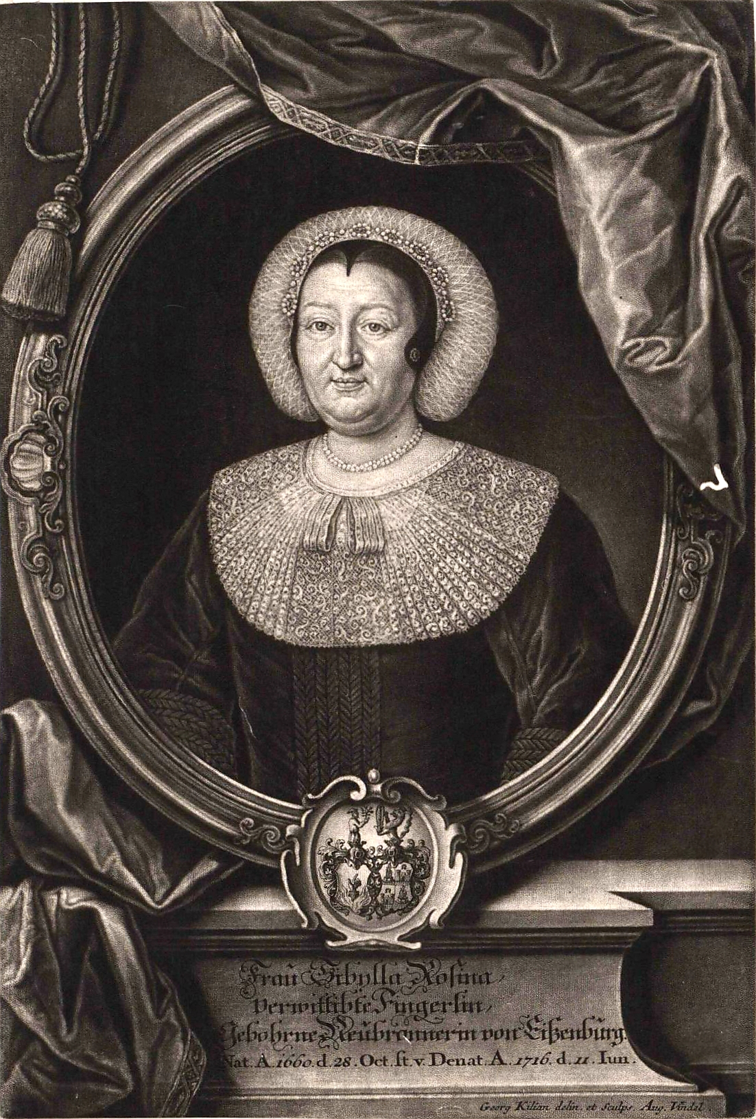 Sibylla Rosina, verwitw. Frau des Ulmer Patriziers (Handelsherrn und Senators) Johann Daniel Fingerlin (* 1640; gest. 1704), geb. Neubronner von Eisenburg (* 1660 in Ulm; gest. 1716 in Ulm), Patrizierin und Schriftstellerin zu Ulm.